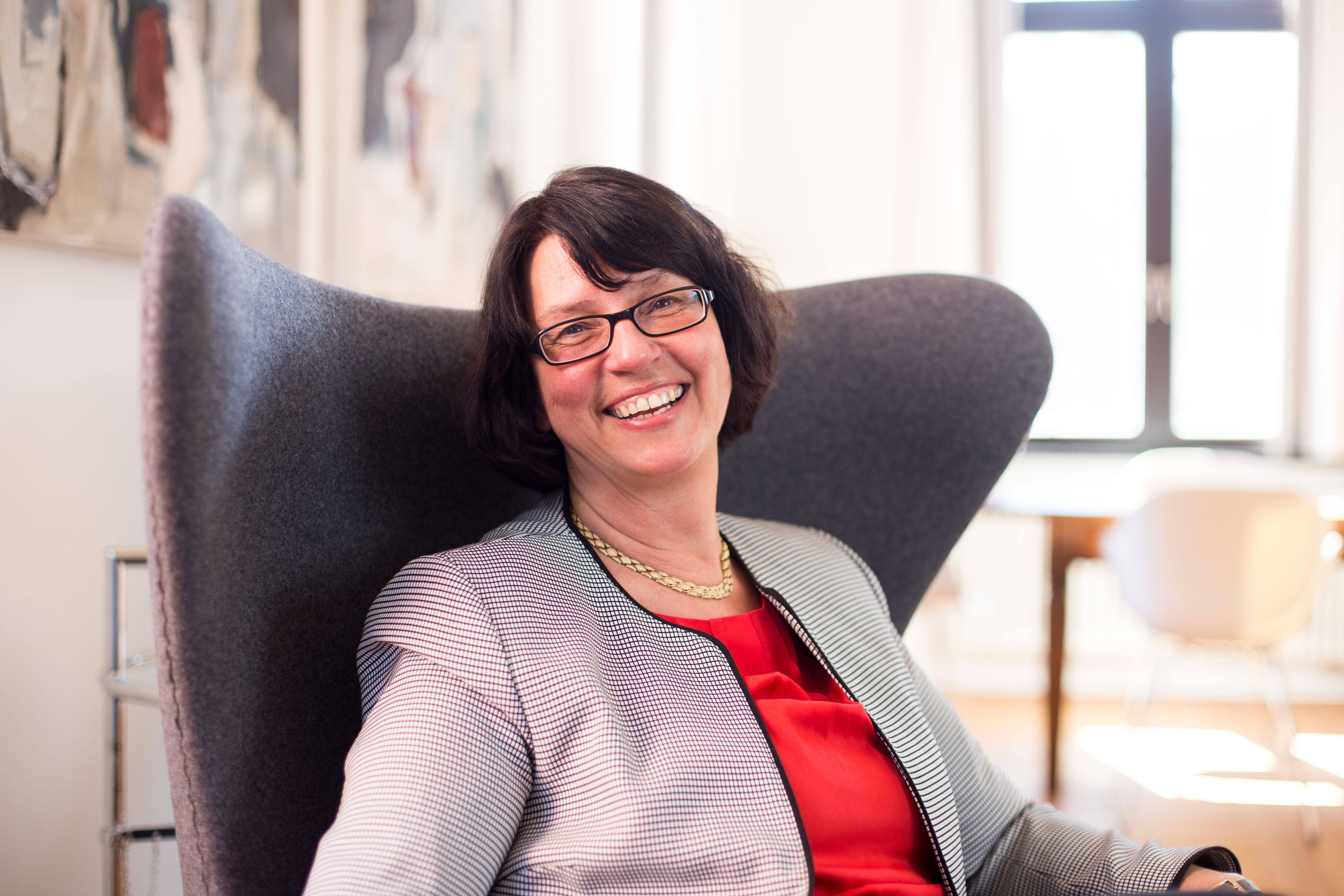 Prof. Dr. Gabriele Gien ist seit dem 1. Oktober 2016 ordentliche Präsidentin der KU Eichstätt-Ingolstadt